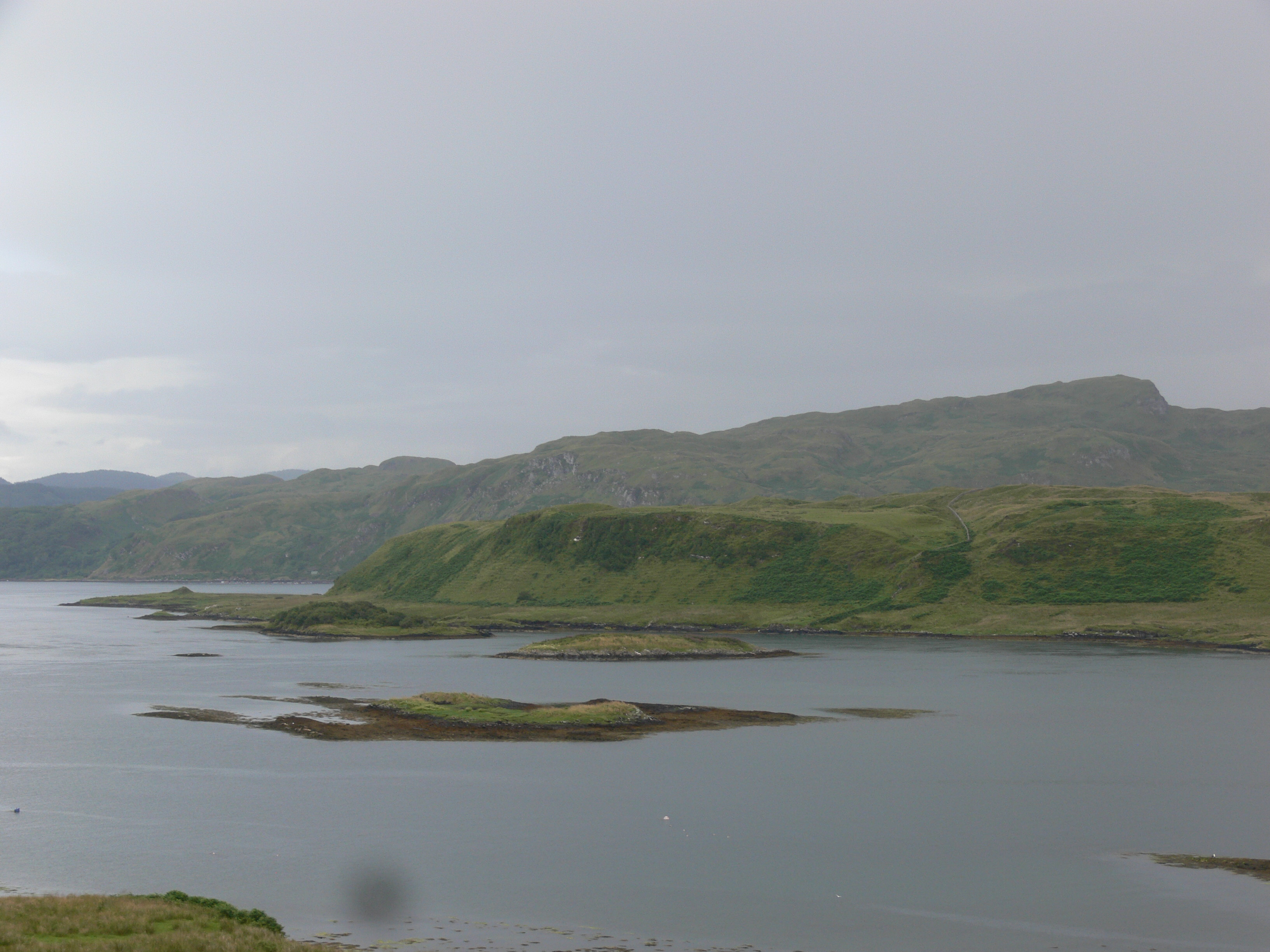 Torsa depuis Luing